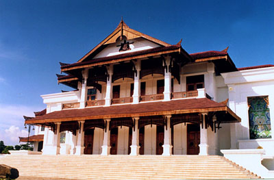 The new Kutai Kartanegara royal palace (kedaton) at Tenggarong, East Kalimantan province, Indonesia